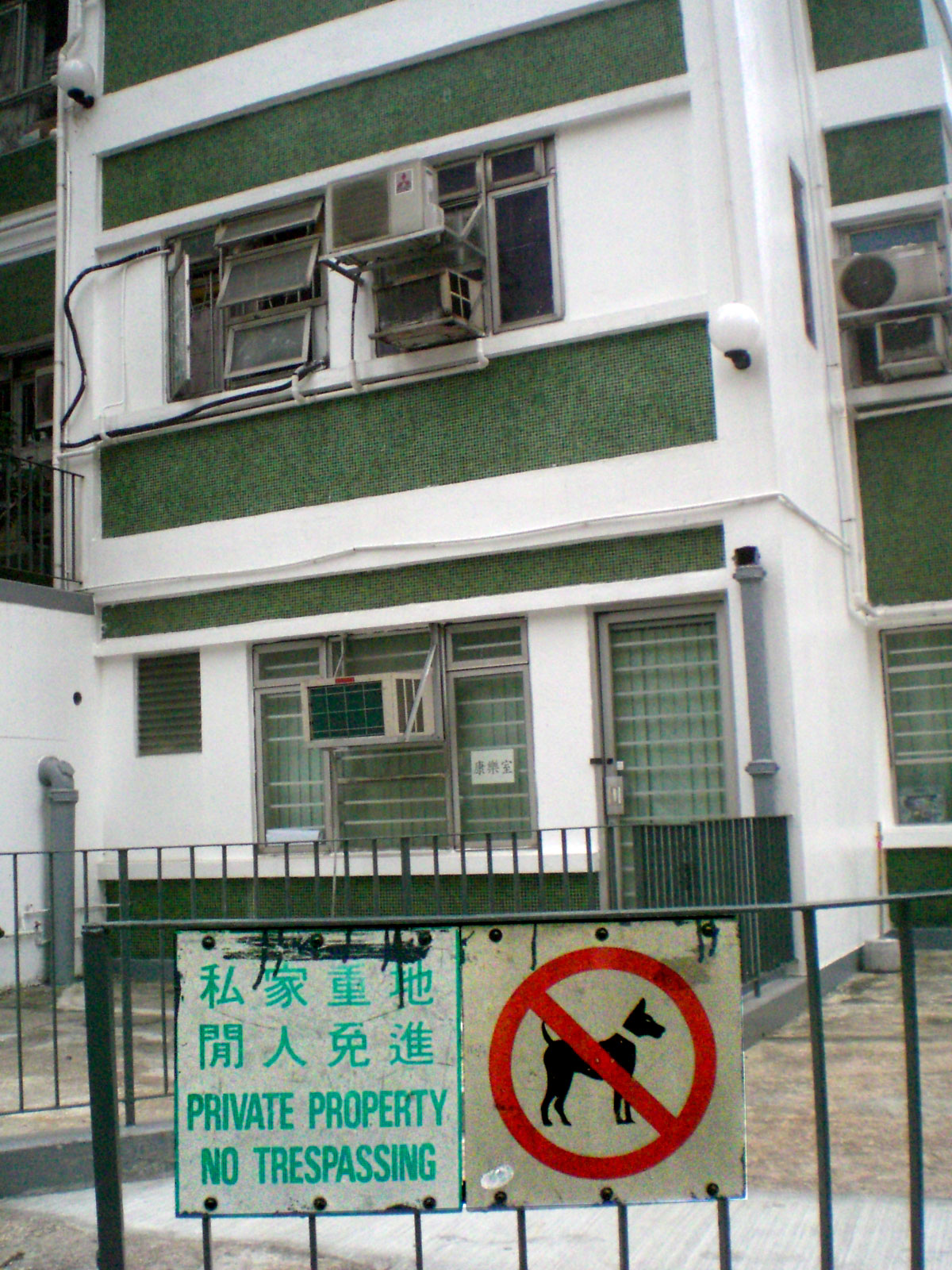 鰂魚涌 南豐新邨 基利路 禁閒人與zh:狗告示